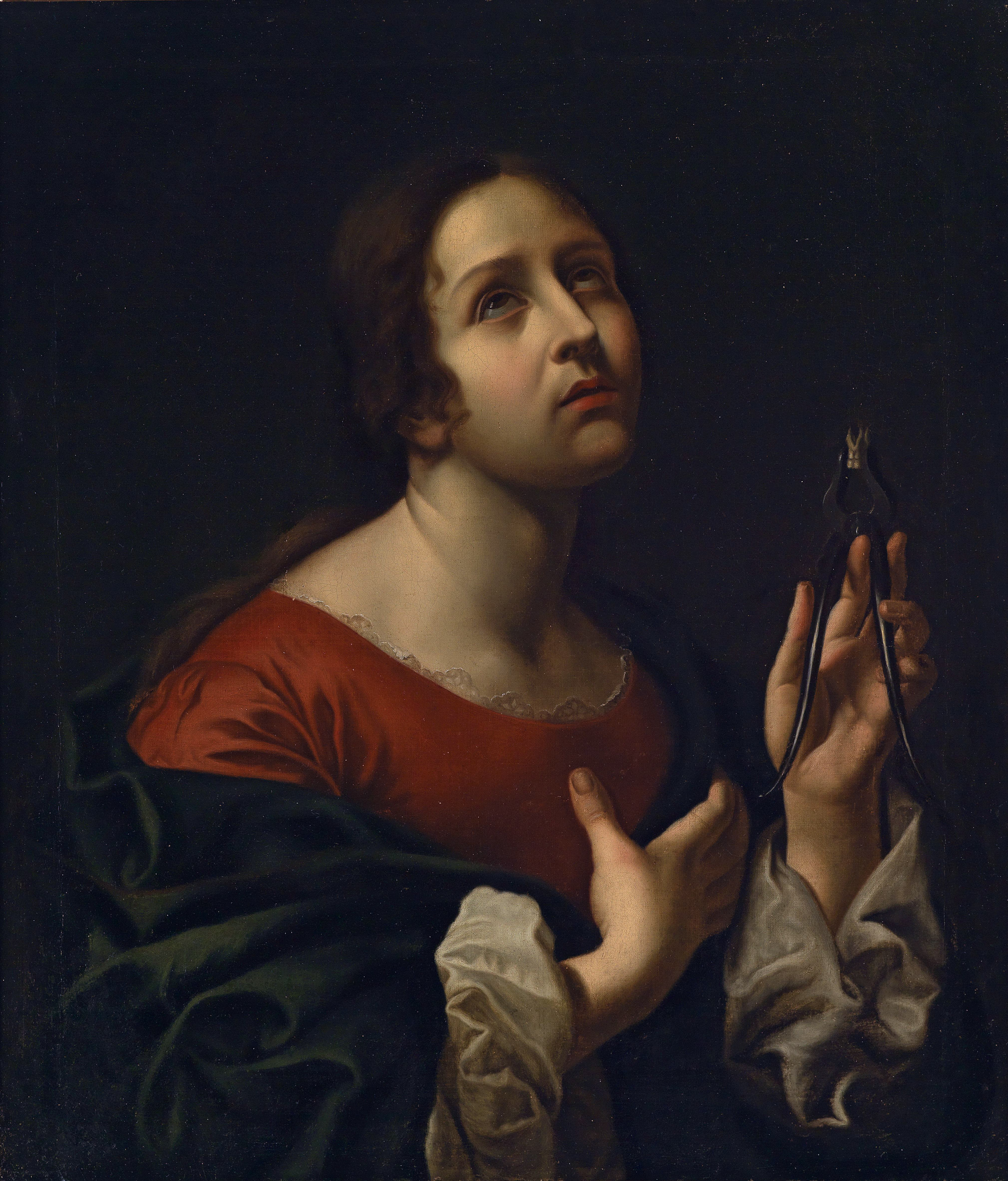 Die heilige Apollonia, Patronin der Zahnärzte